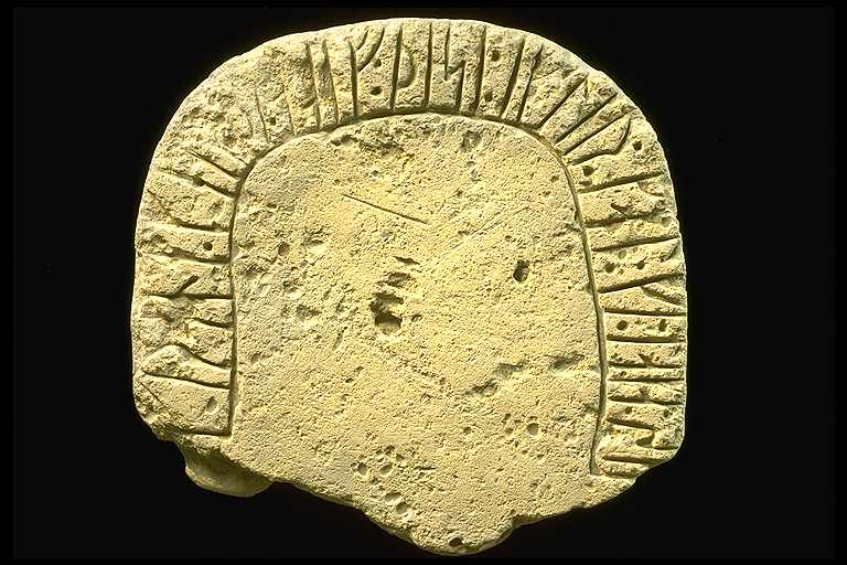 Inskriften lyder: "Grane gjorde detta valv efter Karl (eller Kål), sin kamrat. Motiv: Berezanj (kopia av runstensfragment); Ukraina Nyckelord: Runor Kategori: Runristning/runstenInskriften lyder: "Grane gjorde detta valv efter Karl (eller Kål), sin kamrat.